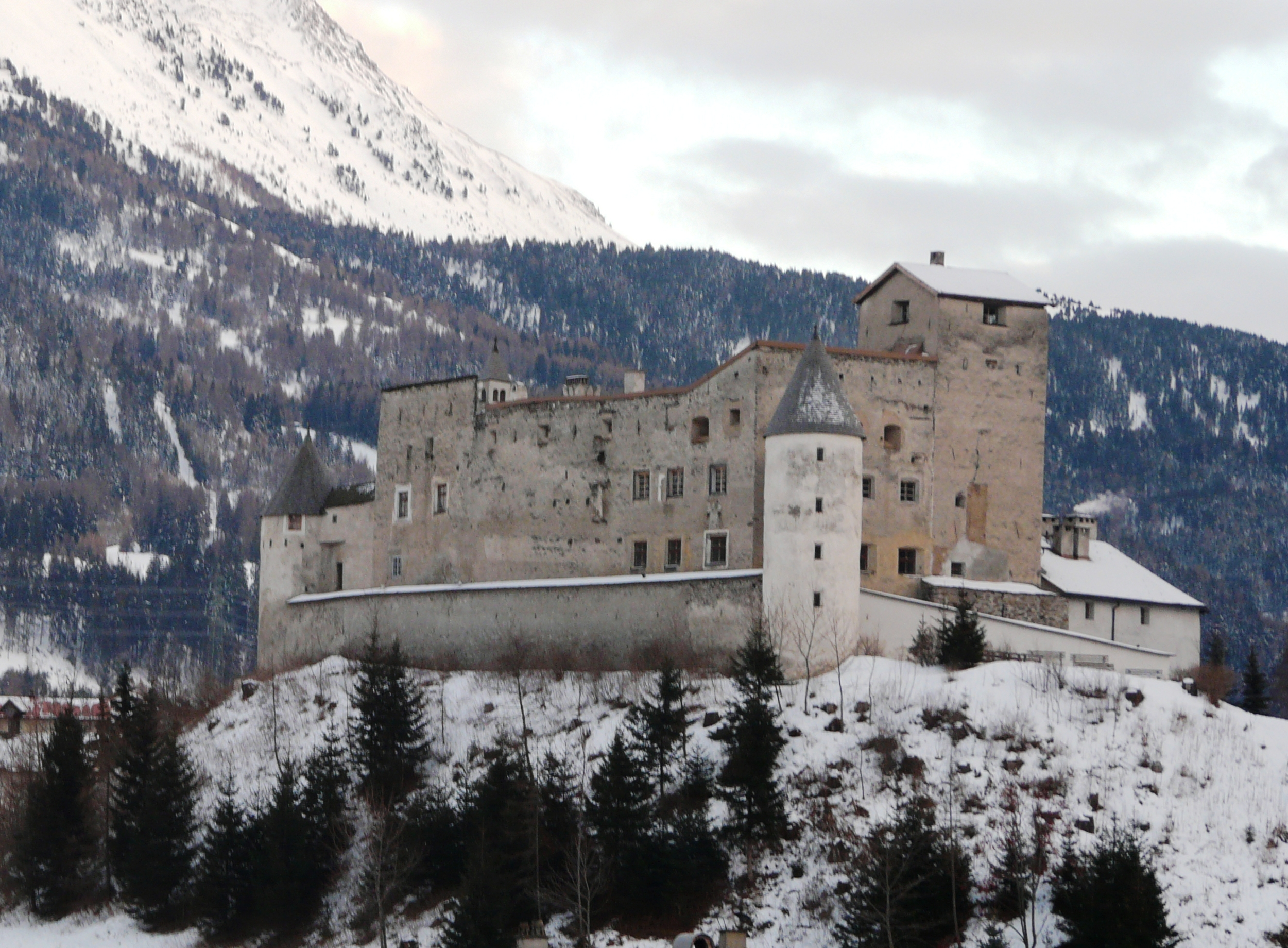 Schloss Naudersberg in Nauders, Tirol